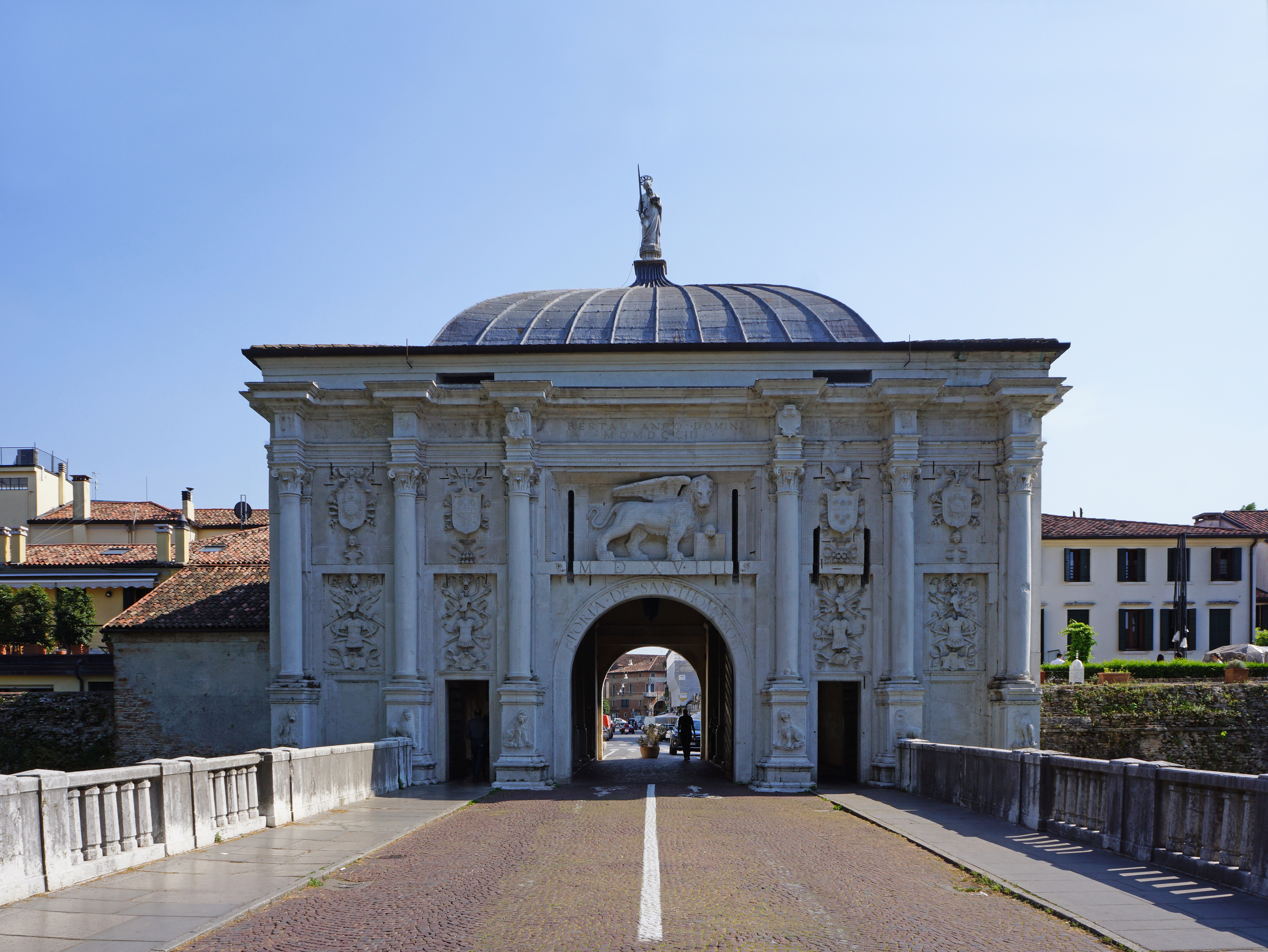 porta San Tommaso è la più monumentale della città, edificata nel 1518 This is a photo of a monument which is part of cultural heritage of Italy.